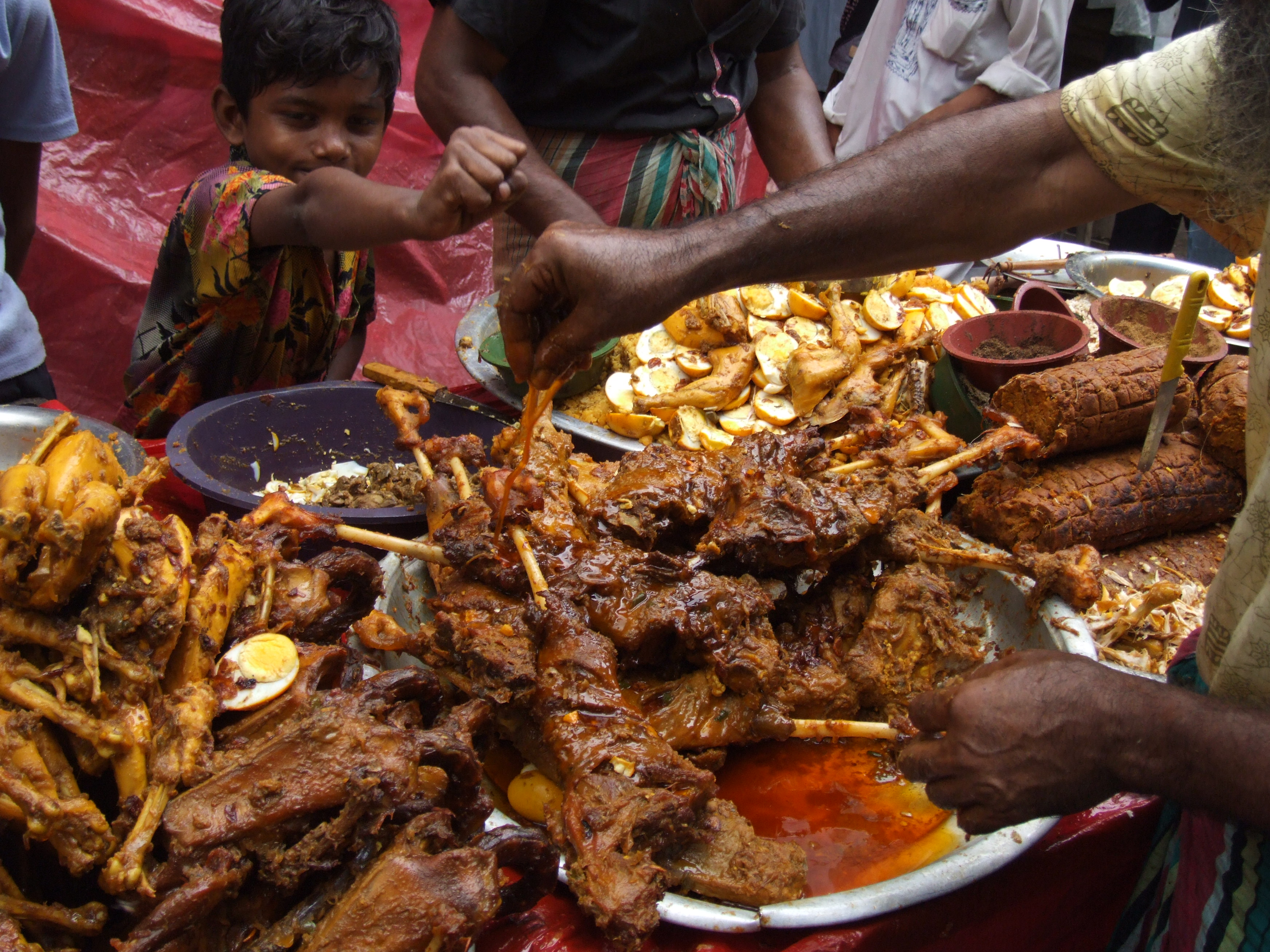 Iftar items available @ puran Dhaka